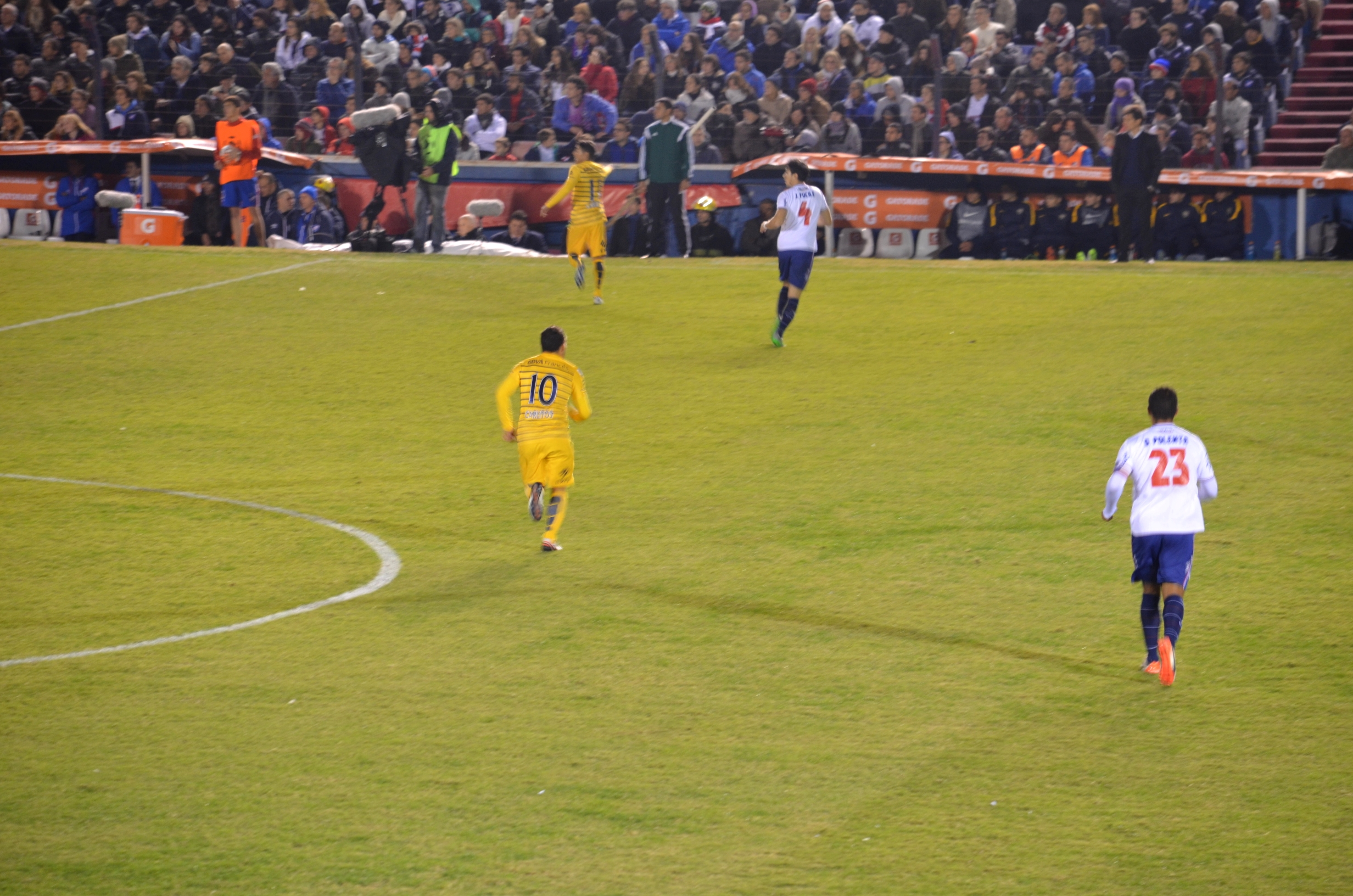 Imagen del partido disputado entre Nacional y Boca Juniors, en el estadio Gran Parque Central, por los cuartos de final de la Copa Libertadores 2016